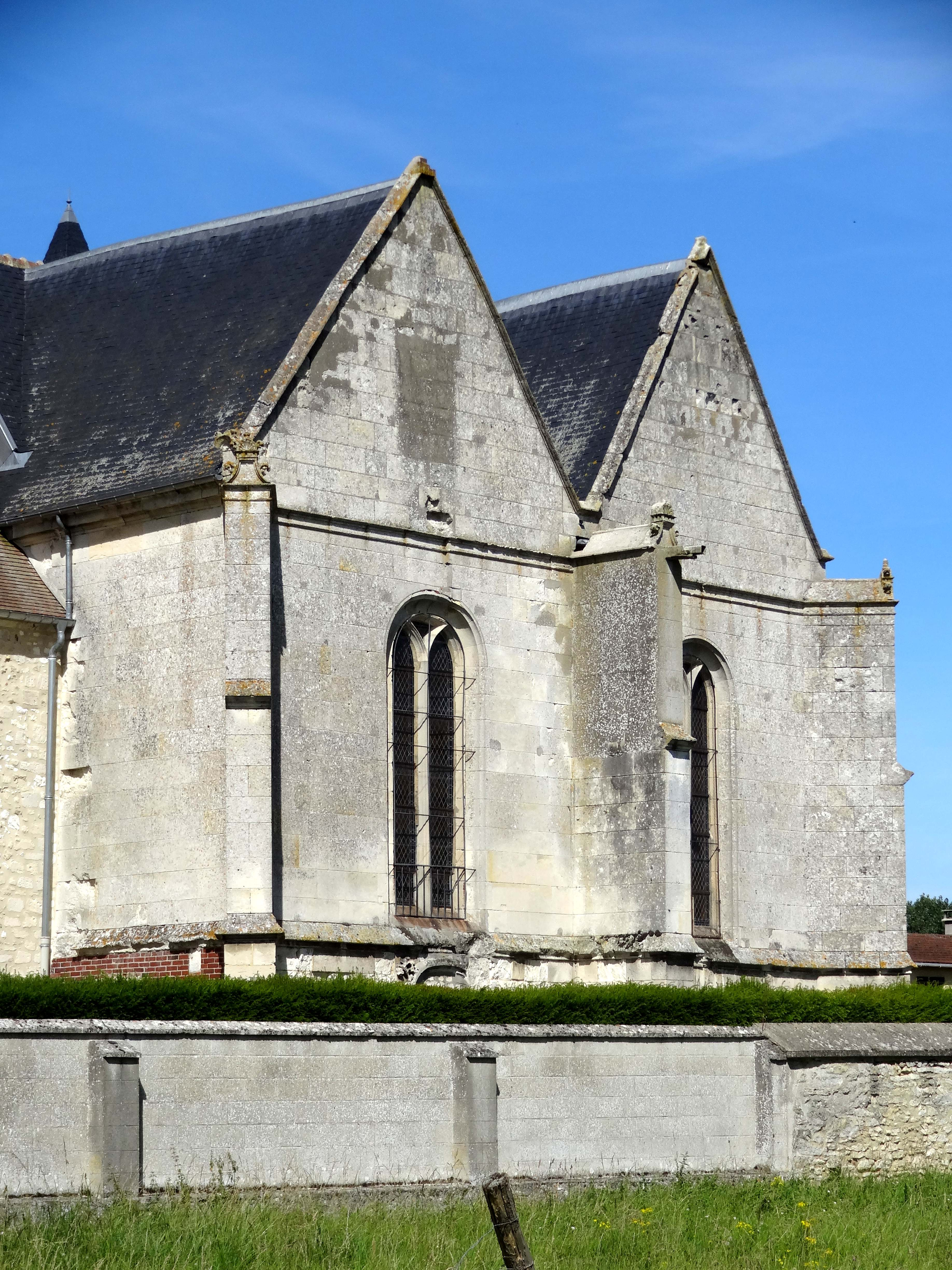 Église Saint-Lucien de Litz - voir titre.